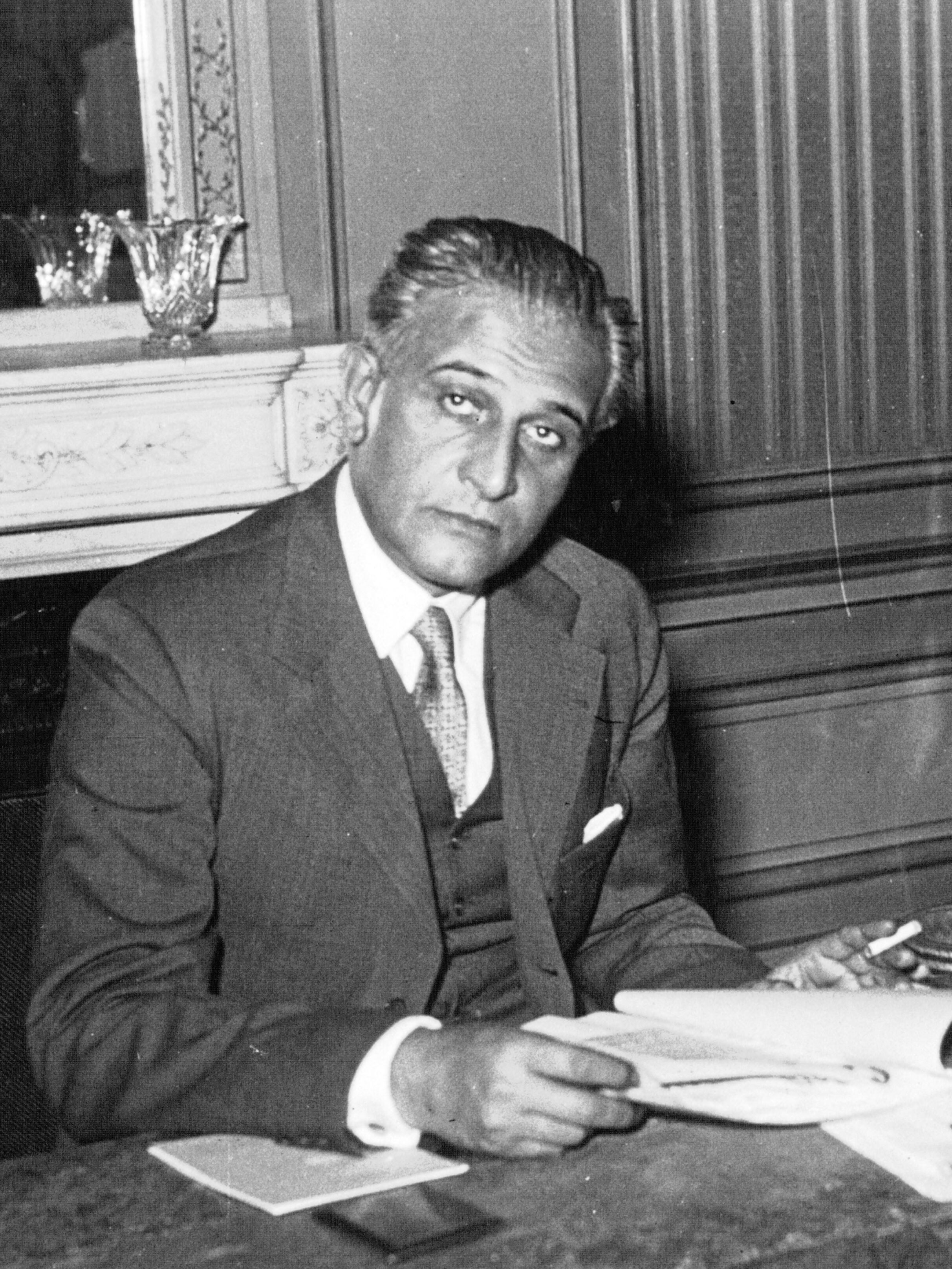 Božidar Purić, embajador yugoslavo en Francia, 1935.